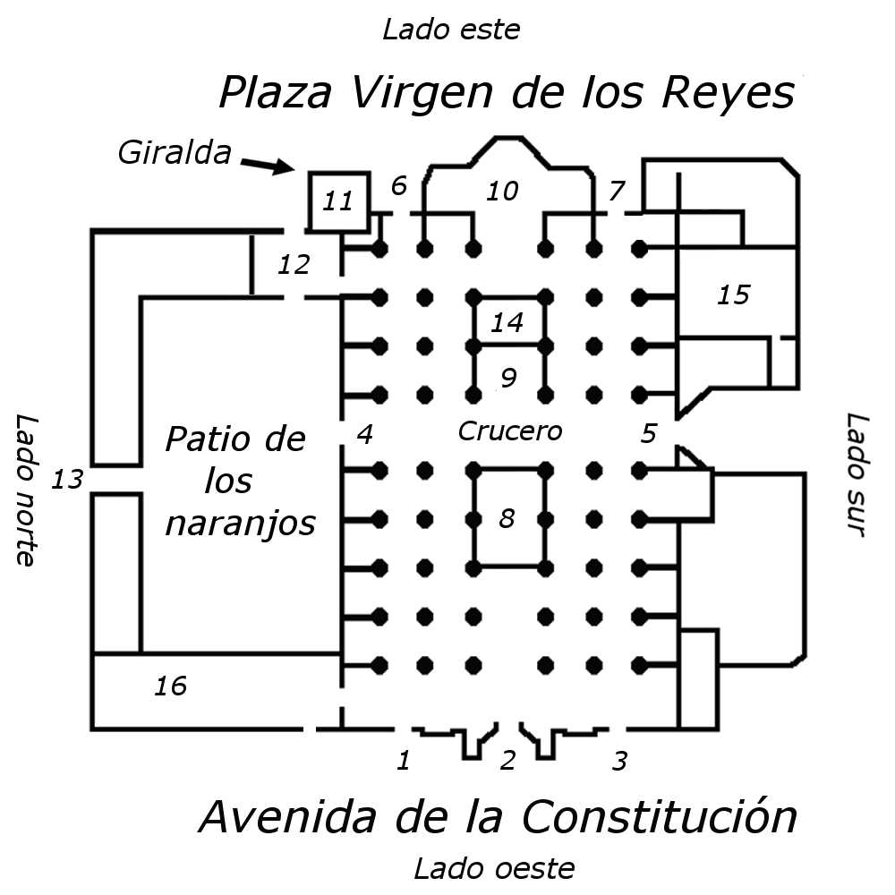 Imagen de la planta de la Catedral de Sevilla. Plano de la catedral de Sevilla 1-Puerta del Bautismo 2-Puerta de la Asunción 3-Puerta de San Miguel 4-Puerta Colorada o de la Concepción 5-Puerta de San Cristóbal o del Príncipe 6-Puerta de Palos 7-Puerta de Campanillas 8-Coro 9-Capilla Mayor y Altar Mayor 10-Capilla Real 11-Giralda 12-Puerta del Lagarto 13-Puerta del Perdón 14-Sacristía del Altar Mayor 15-Sacristía Mayor 16-Iglesia del Sagrario